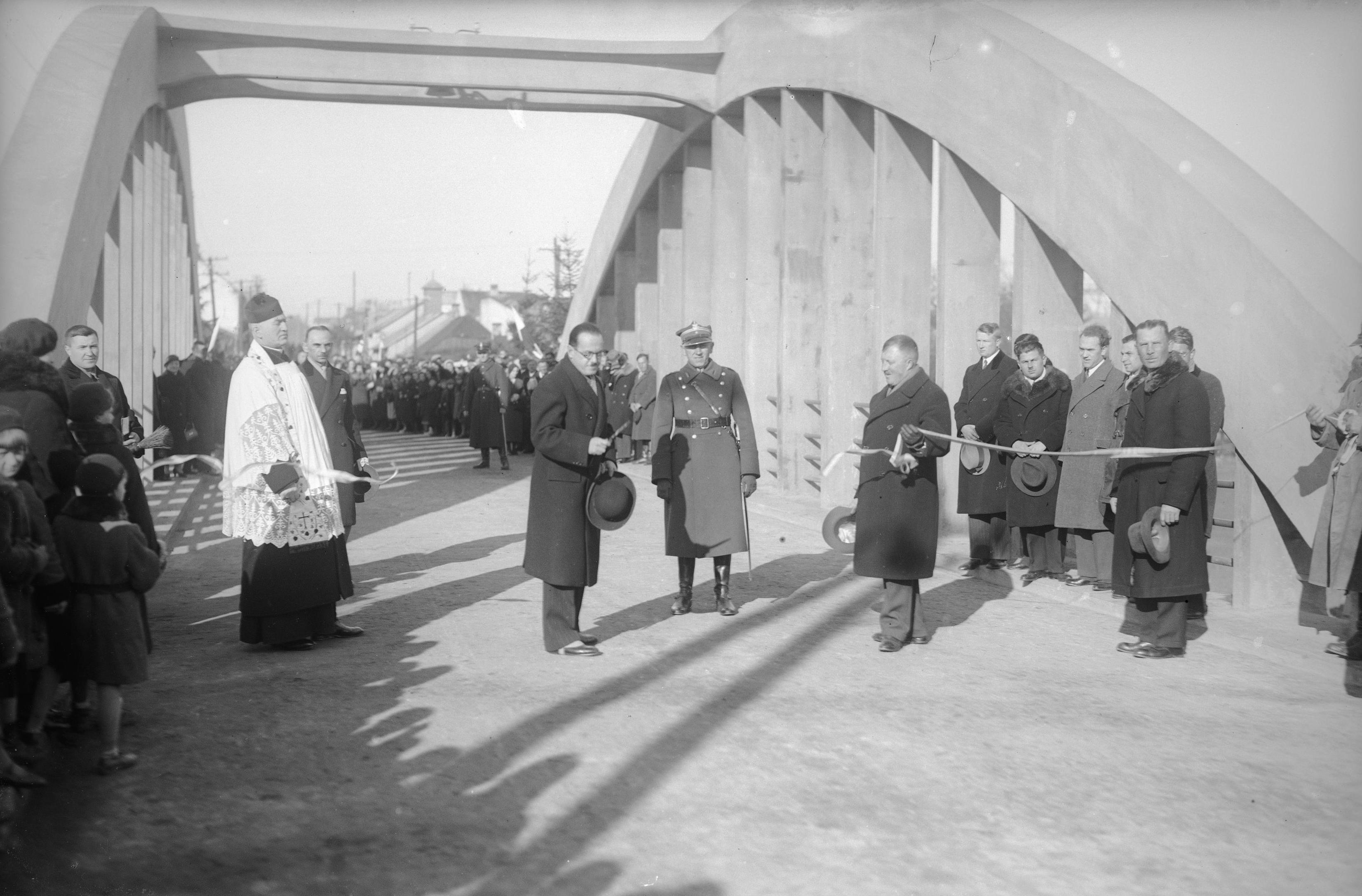 Starosta Włodzimierz Kałuba przecina wstęgę. Widoczny także m.in. ks. Marian Juszczyk.